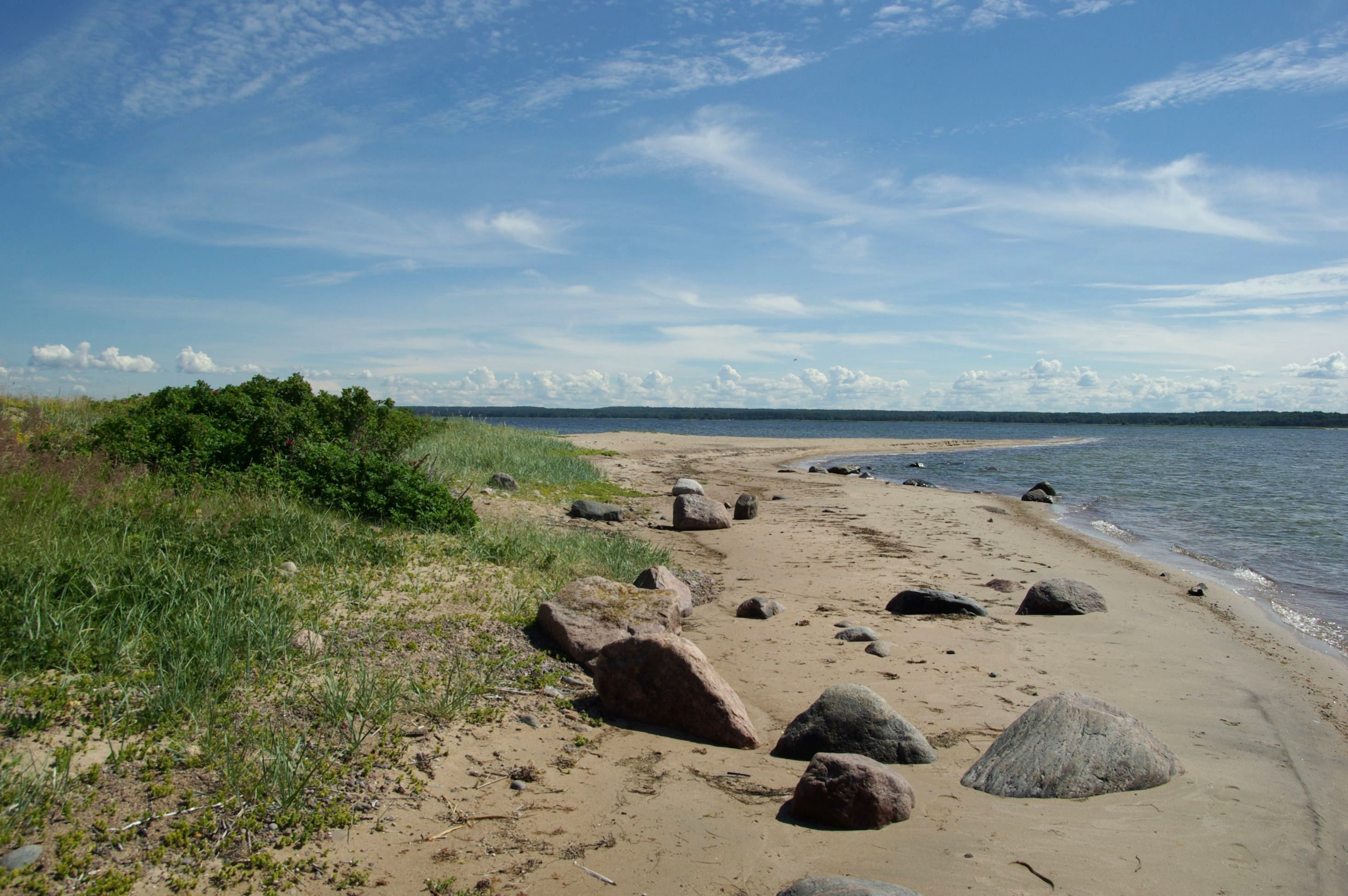 Pedassaar on saar Põhja-Eestis Kolga lahes.Saar asub umbes kilomeetri kaugusel Salmistu külast.